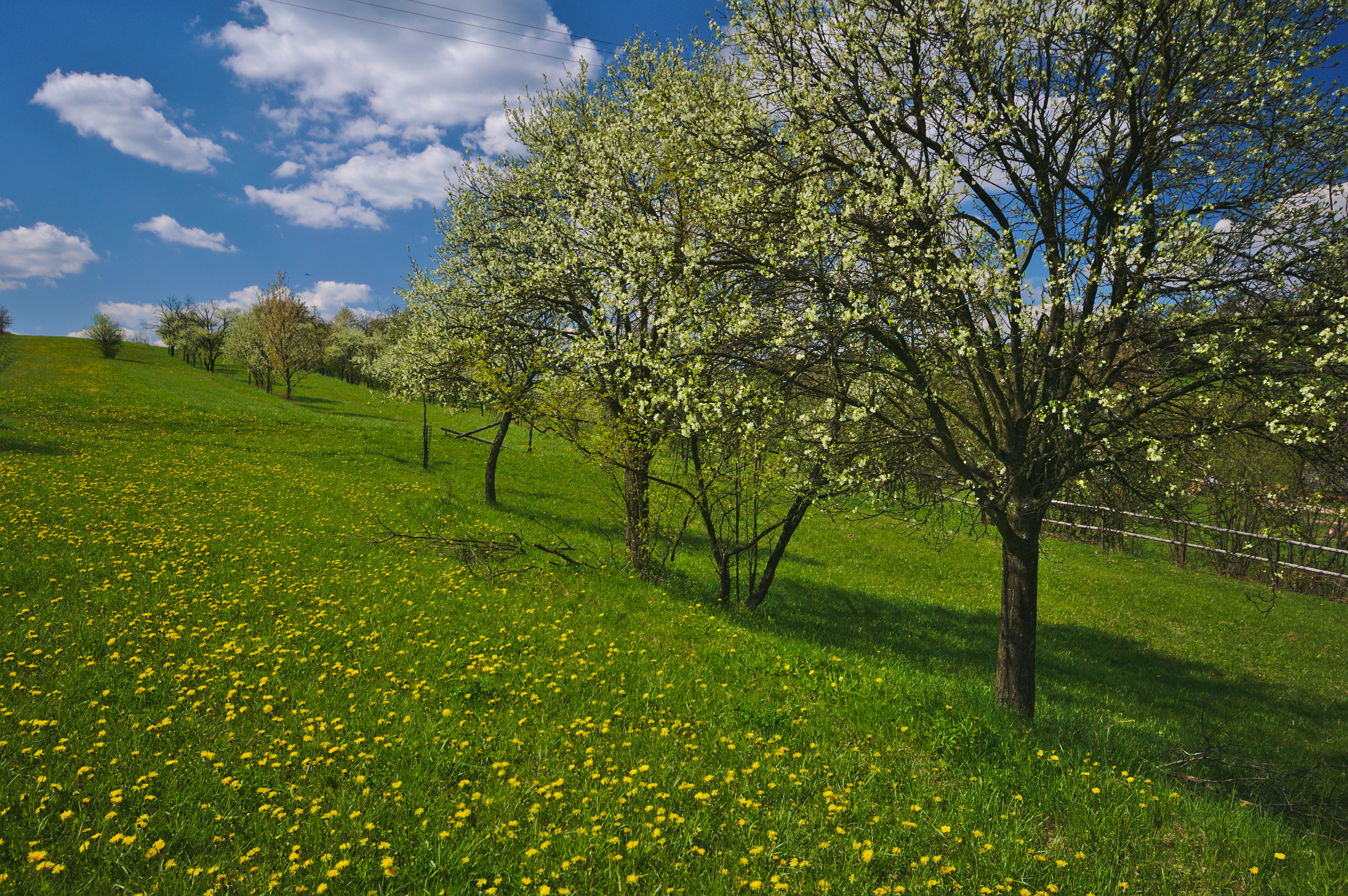 Přírodní památka Lačnov, okres Vsetín